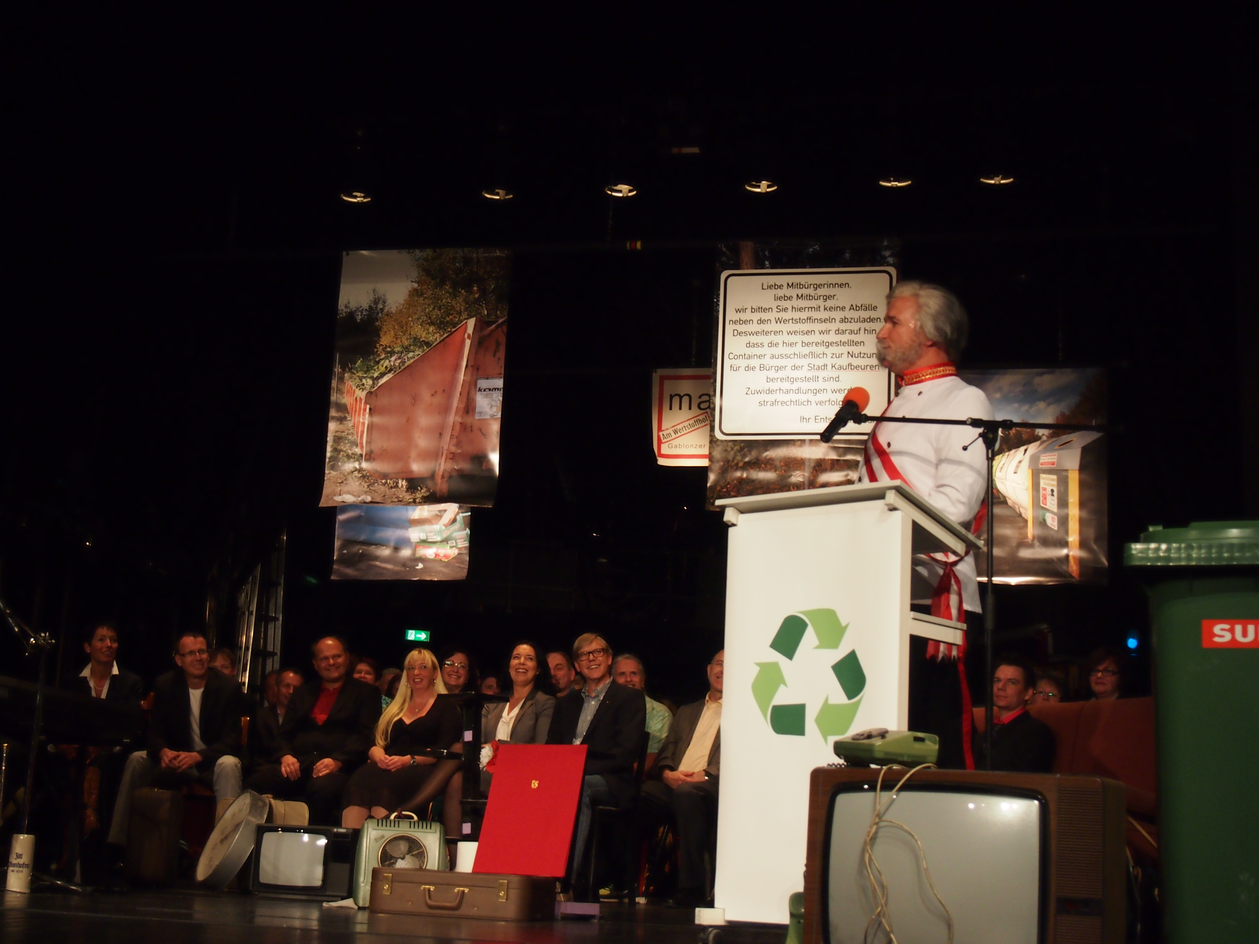 Wolfgang Krebs als Kaiser Franz Josef bei der Verleihung des Kulturpreises der Stadt Kaufbeuren 2013 an die Paurische Mundart-Band "Mauke" aus Neugablonz im Stadttheater Kaufbeuren.